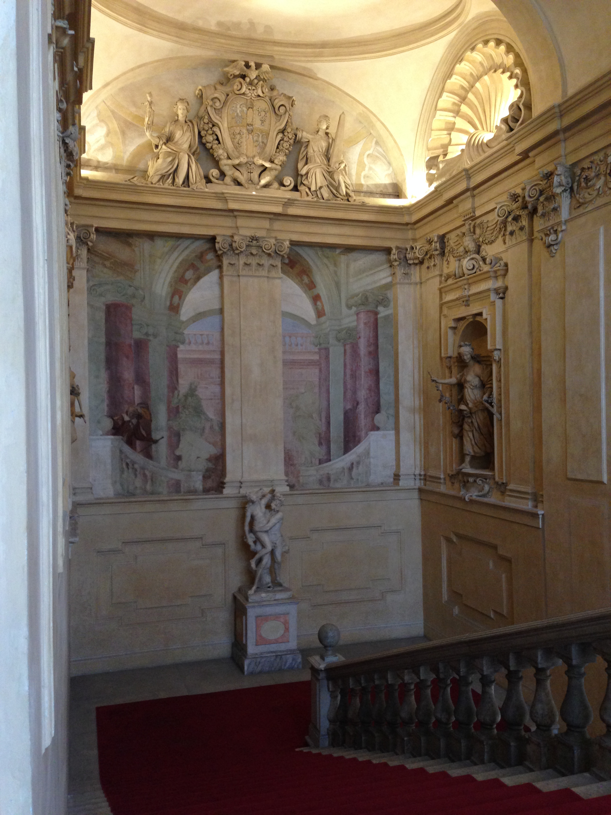 Palazzo e Parco Ducale This is a photo of a monument which is part of cultural heritage of Italy.